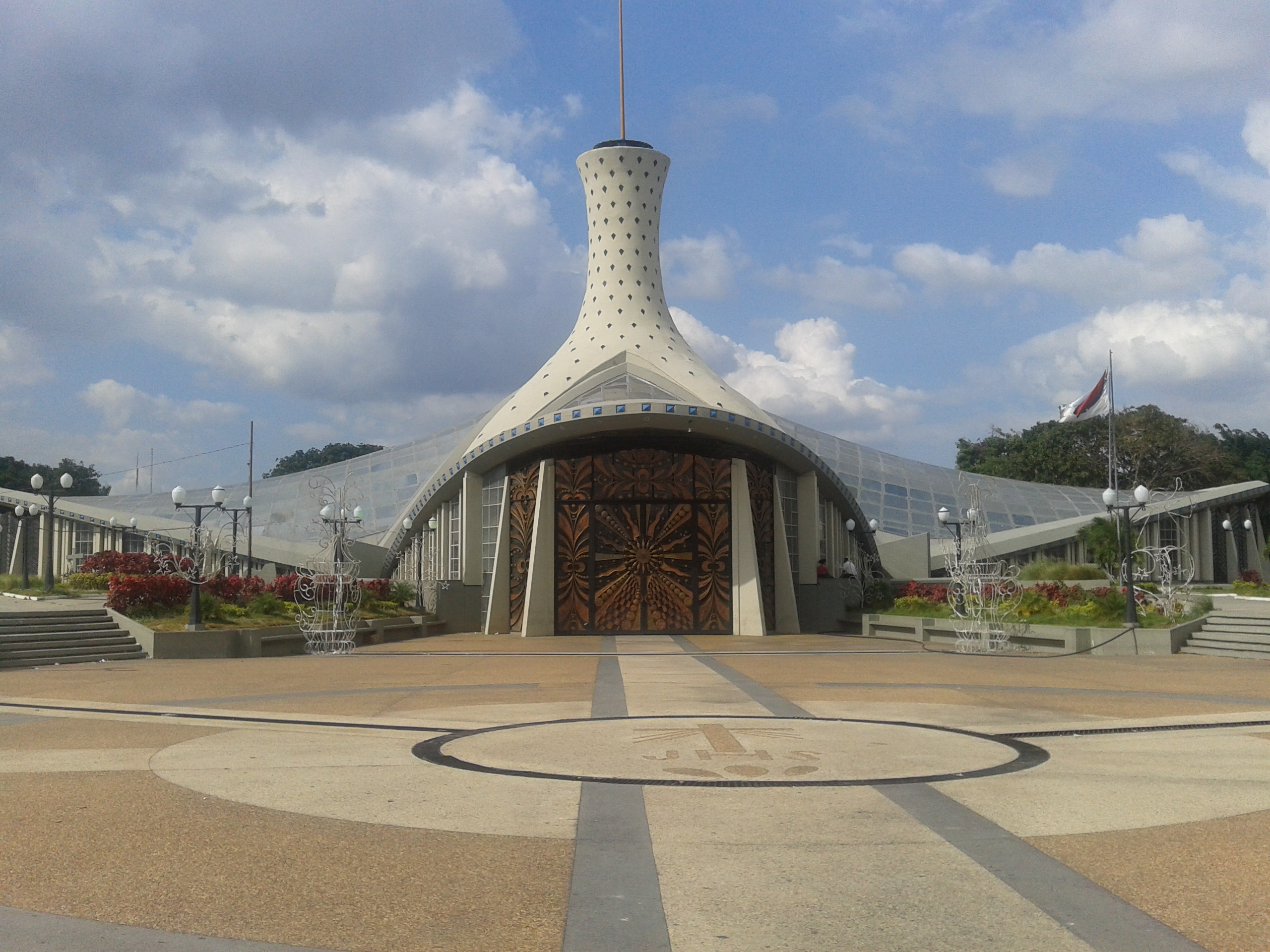 Barquisimeto cuenta con una de las más modernas y originales catedrales de América Latina